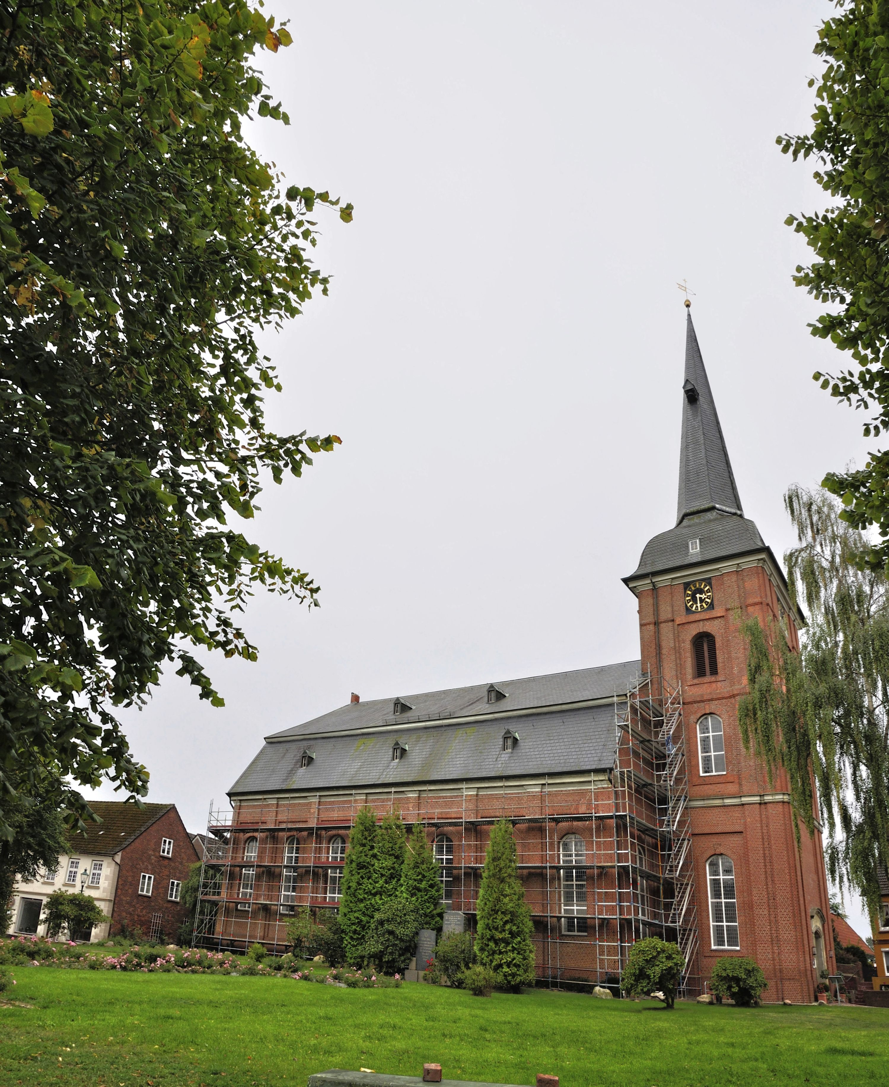 Osten 2018 -Details folgen